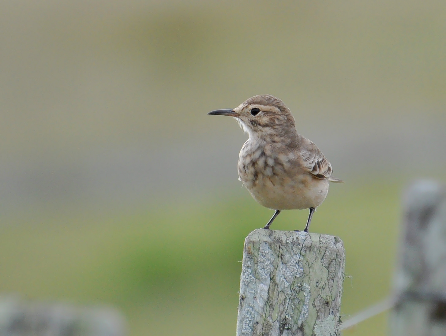 Geositta cunicularia subsp. cunicularia photographed in Rio Grande do Sul, Brazil, in May 2010.